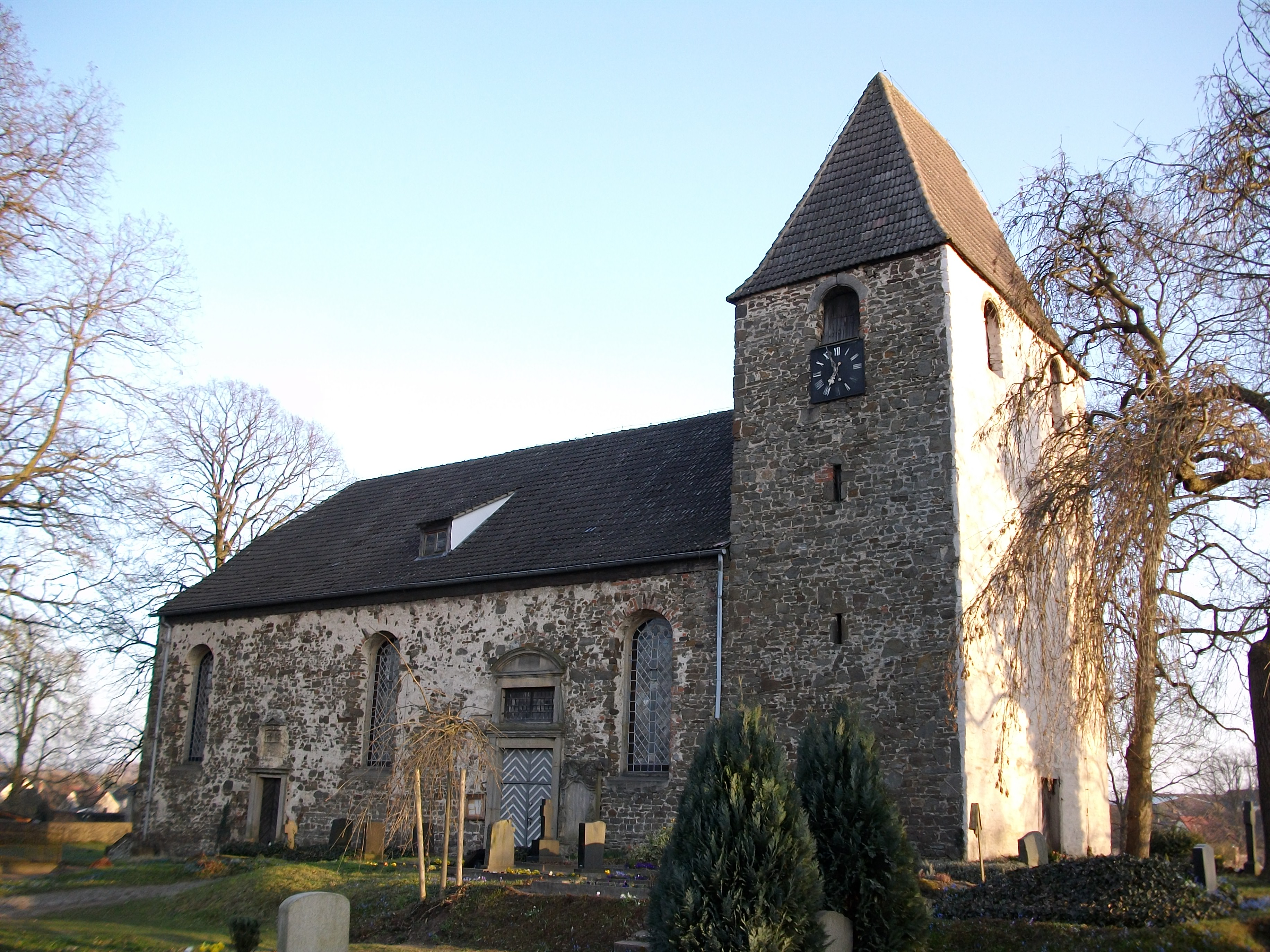 Dorfkirche Sankt Andreas in Hundisburg